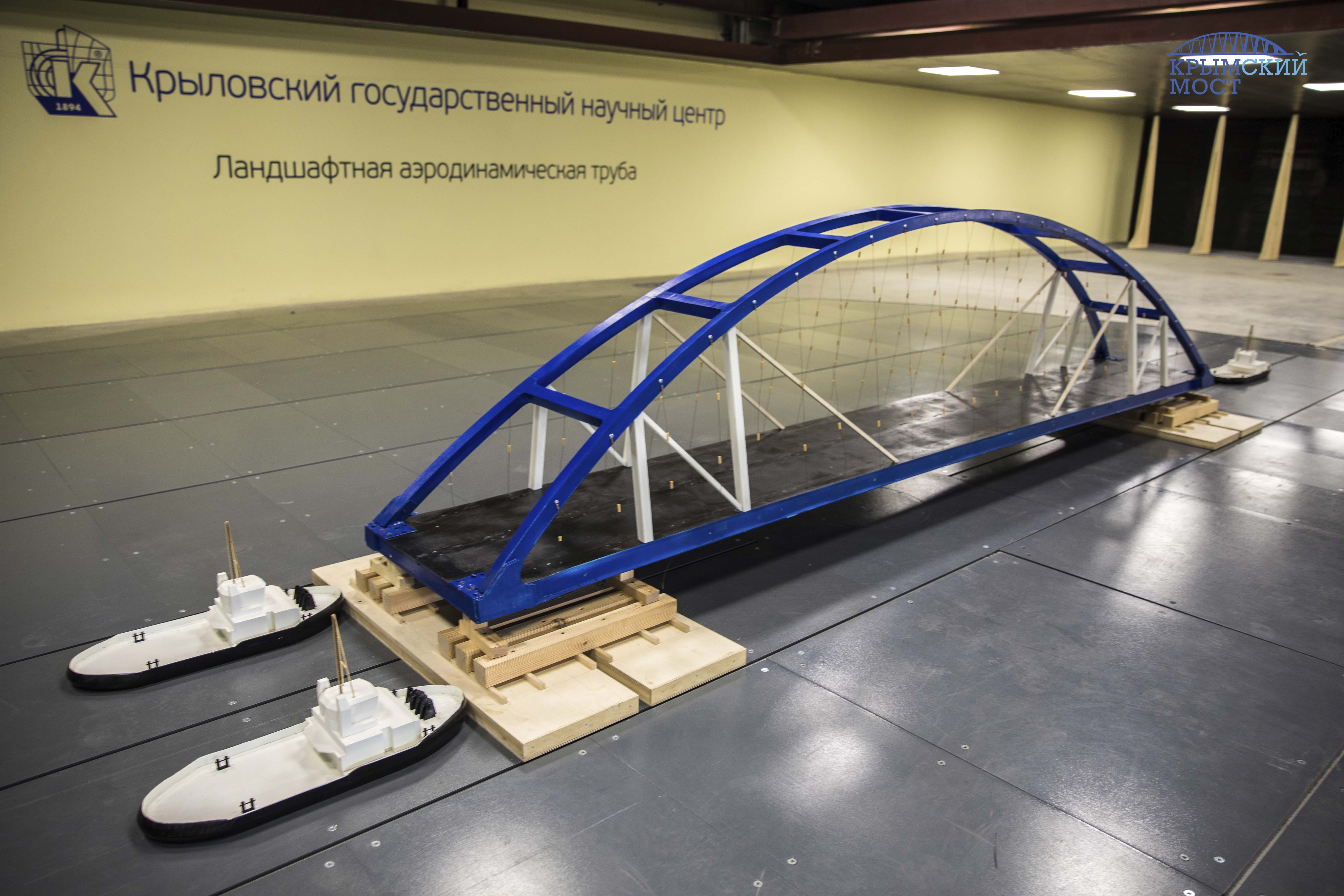 Модель транспортируемой арки Крымского моста